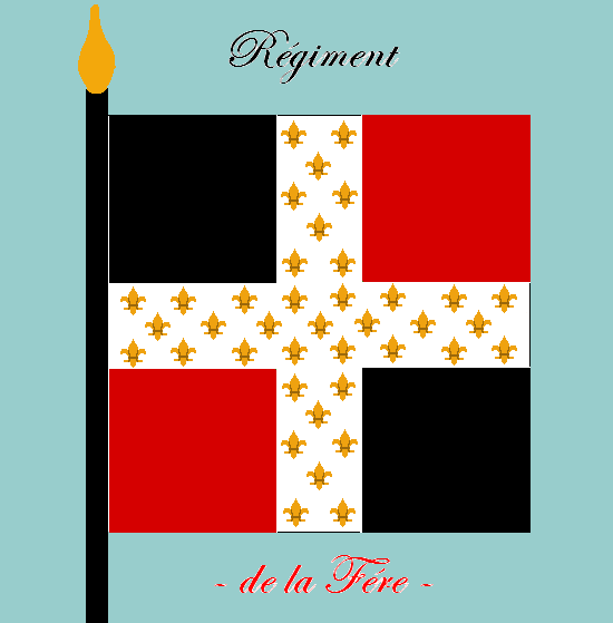 Ordonnanzfahne des königlich französischen Infanterie-Regiments „de la Fère“. - Entnommen und überarbeitet aus: „LES UNIFORMES ET LES DRAPEAUX DE L'ARMÉE DU ROI“ Marseille 1899. (Drapeau d'Ordonnance du régiment française d'infanterie royale „de la Fère“.)